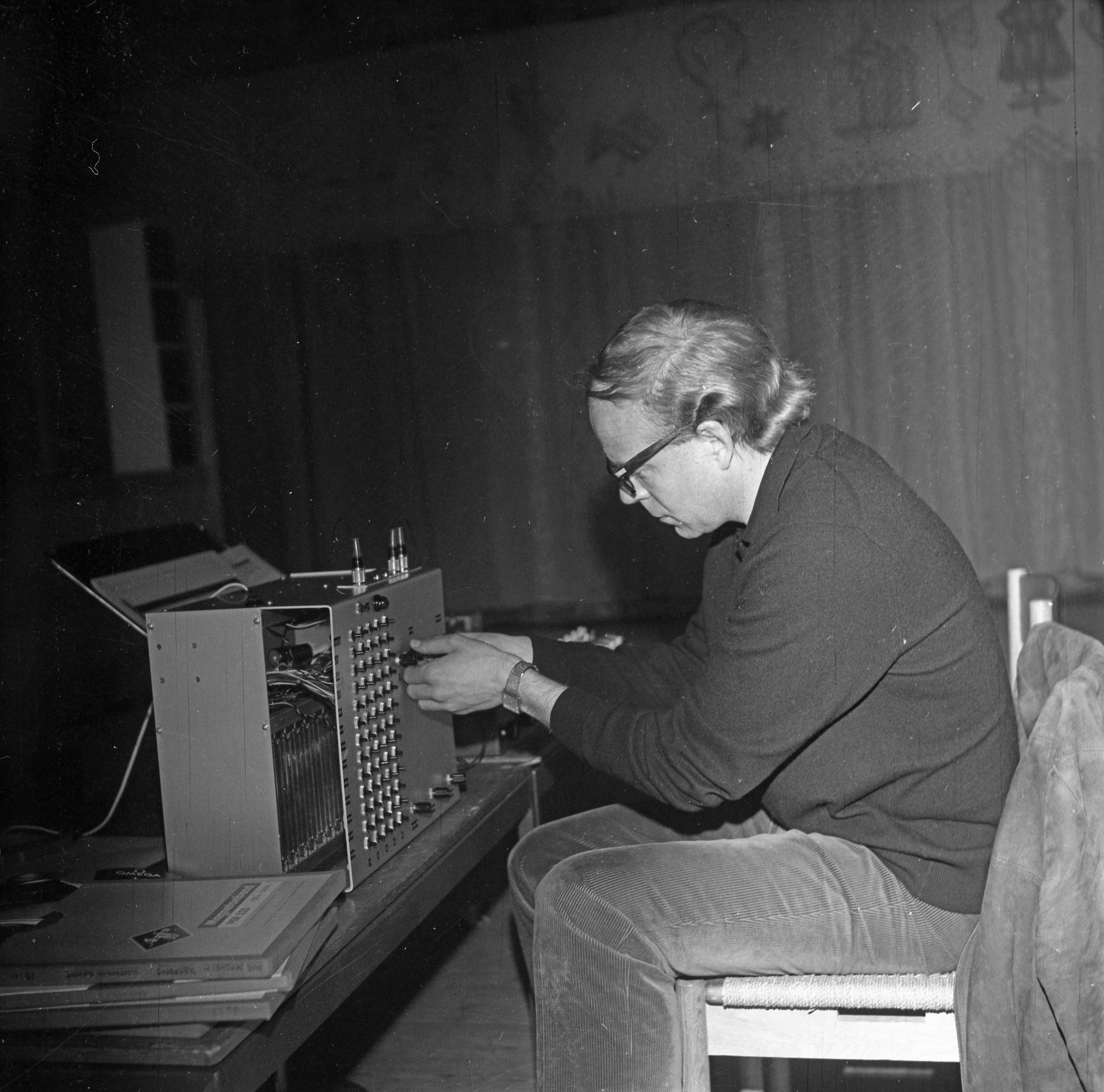 Format: Negativ 120 film Dato / Date: 1968 Fotograf / Photographer: Eirik Sundvor (1902 - 1992) Sted / Place: Håkonshallen, Bergen Wikipedia: Arne Nordheim (1931 - 2010) Wikipedia: Festspillene i Bergen Eier / Owner Institution: Trondheim byarkiv, The Municipal Archives of Trondheim Arkivreferanse / Archive reference: Tor.H43.B78.F14604 Arne Nordheim med filtreringsapparat. Fra Håkonshallen under Festspillene i Bergen 1968.